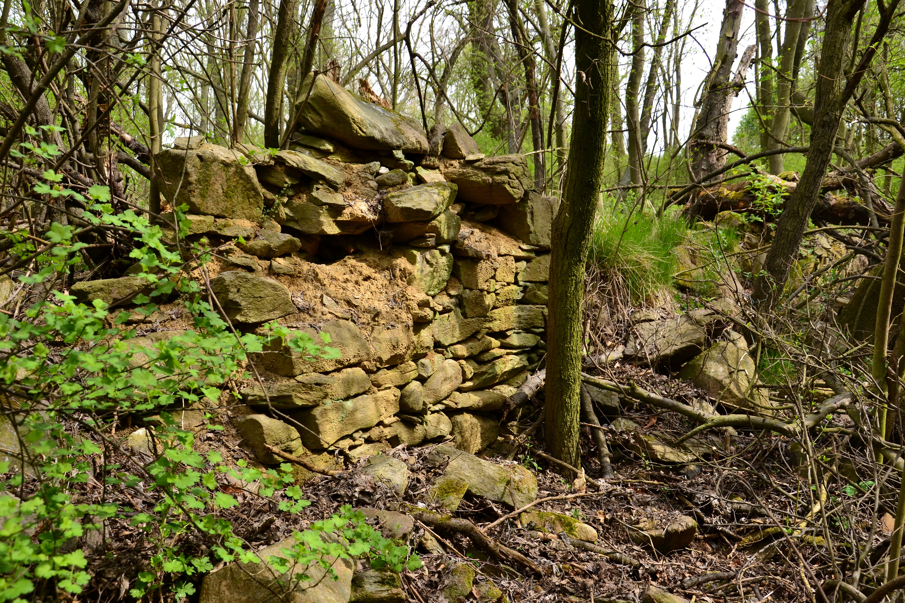 Fragment zdiva v areálu bývalého vernéřovského zámku